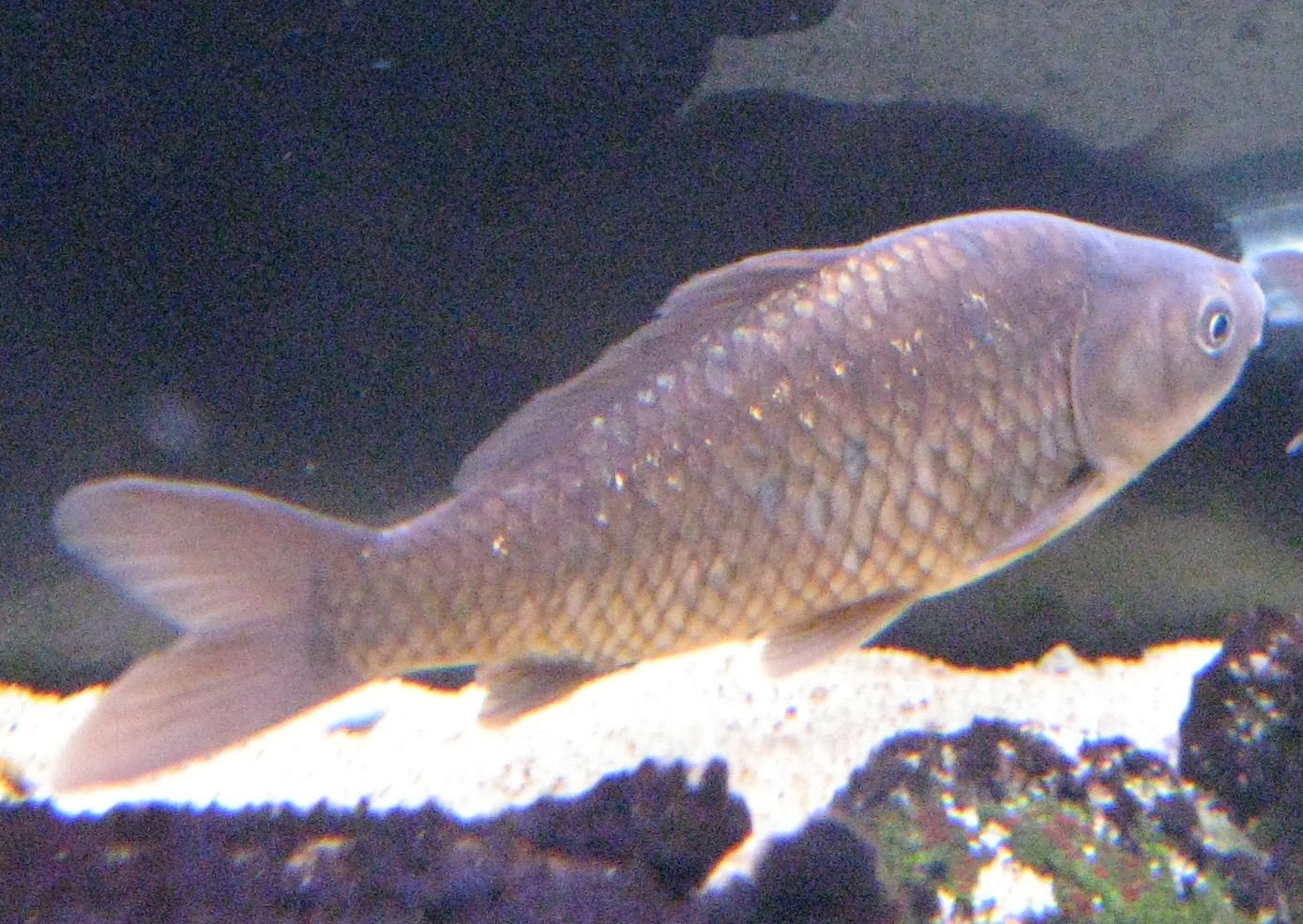 Scientific name Carassius auratus grandoculis